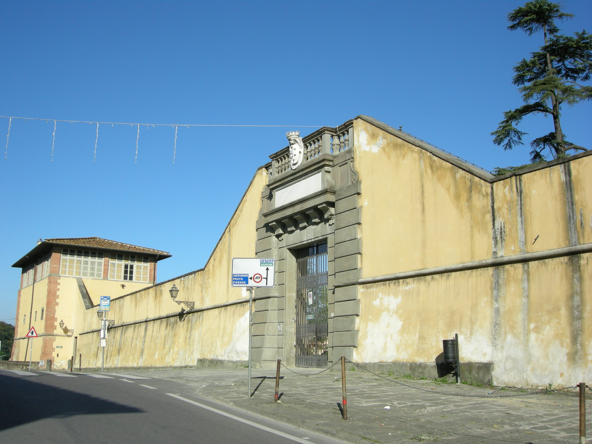 Villa di poggio a caiano, entrata